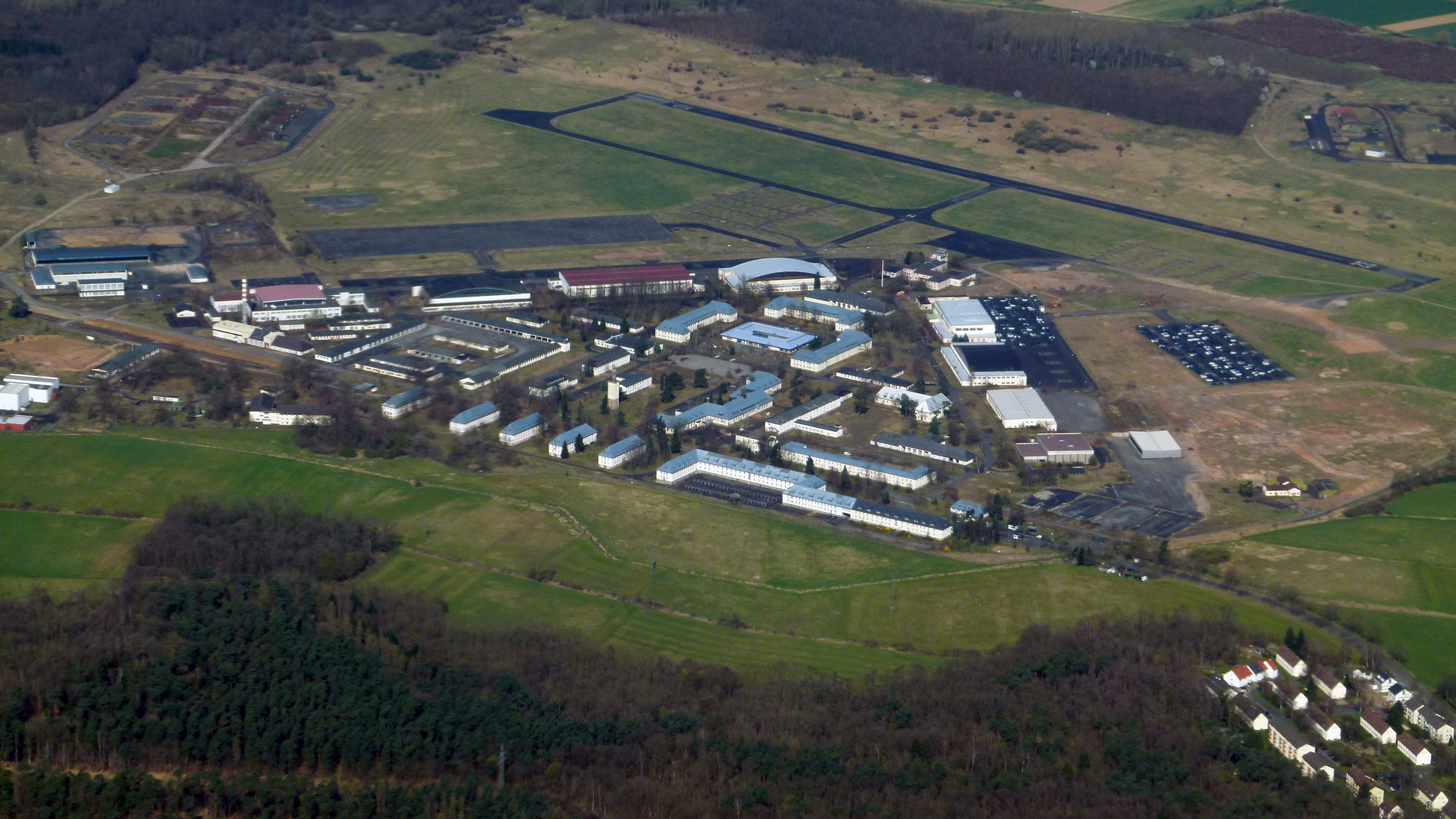 Fliegerhorst Erlensee-Langendiebach